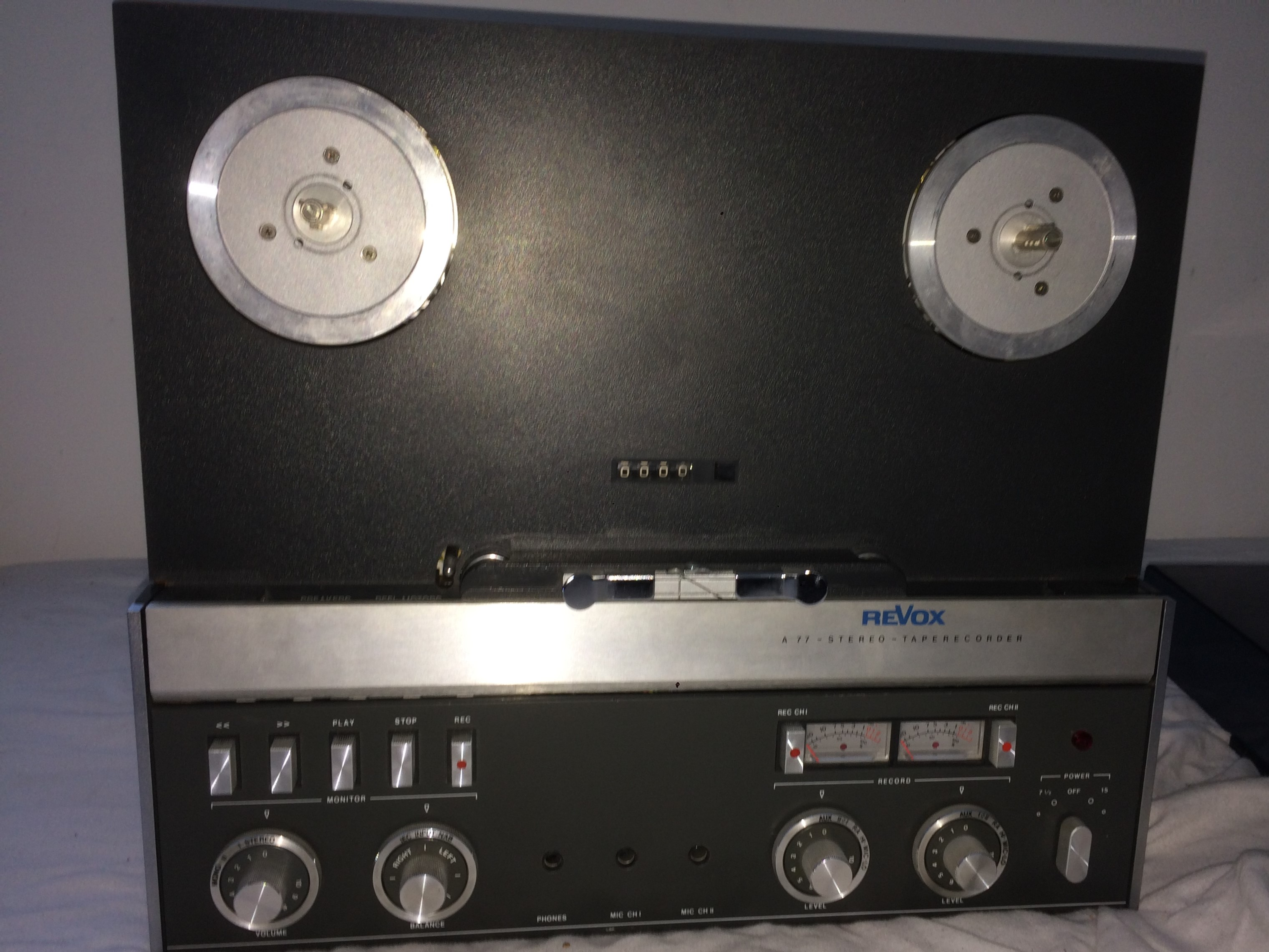 Eine Revox A77 MK IV High Speed